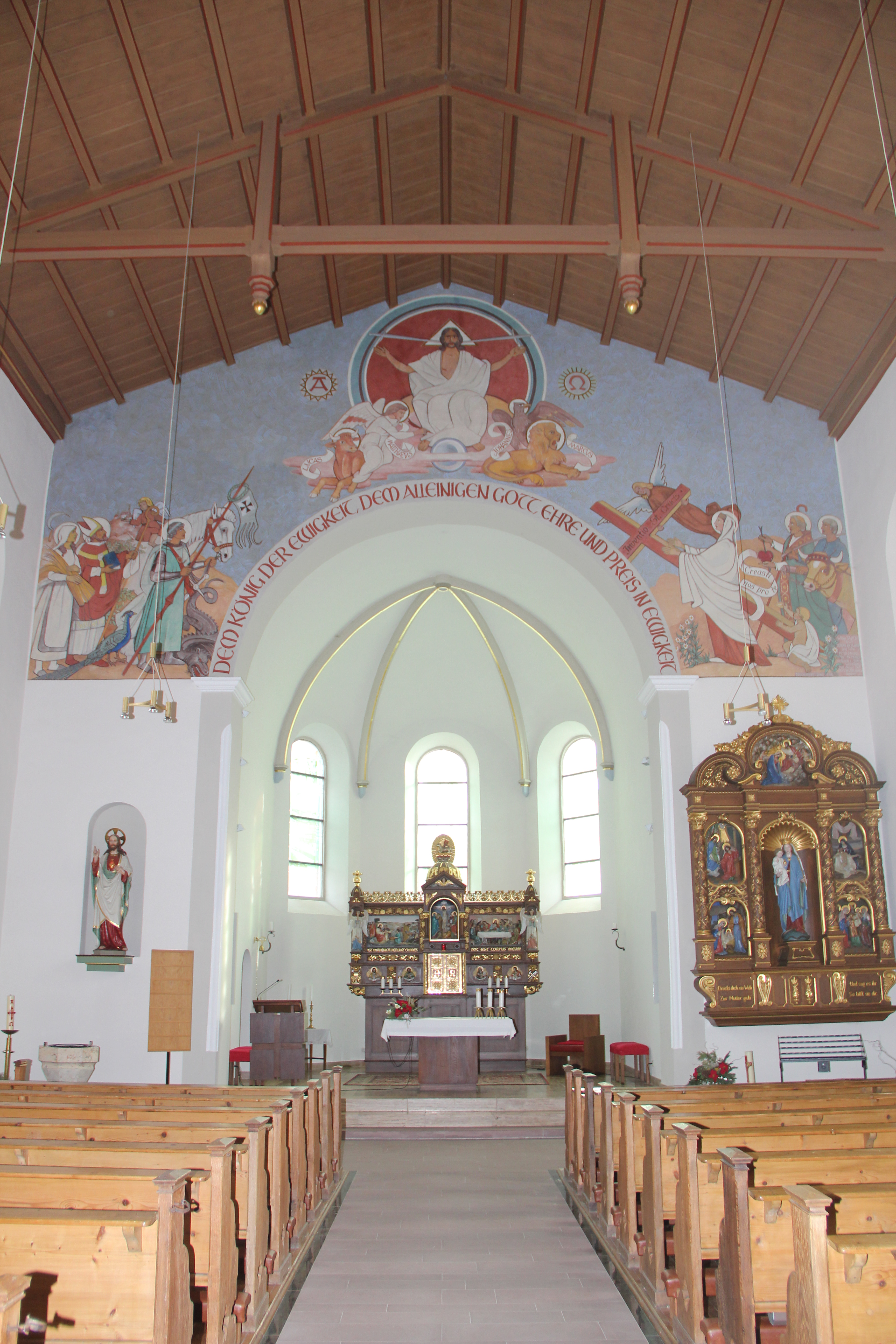 Innenansicht der Heilig-Kreuz-Kirche in Hildebrandshausen